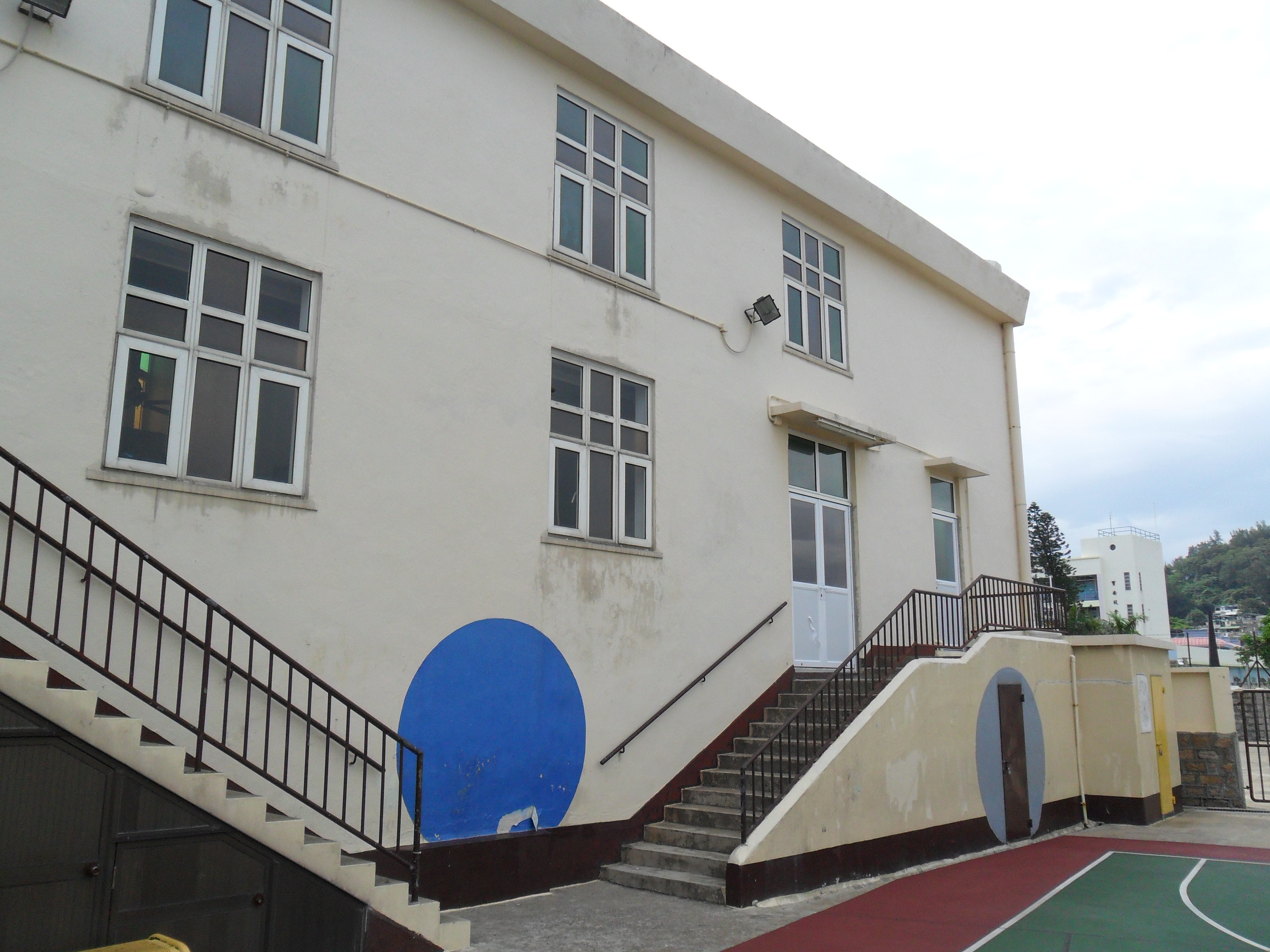 中文（香港）: 長洲花地瑪聖母堂, 香港, 中國